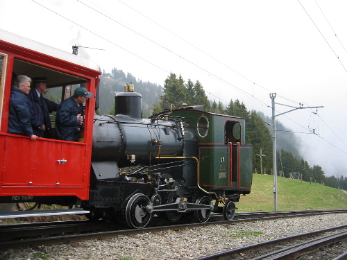 Historische Dampf-Lokomotive der Vitznau-Rigi-Bahn im Bahnhof von Rigi-Kaltbad (Mai 2004).